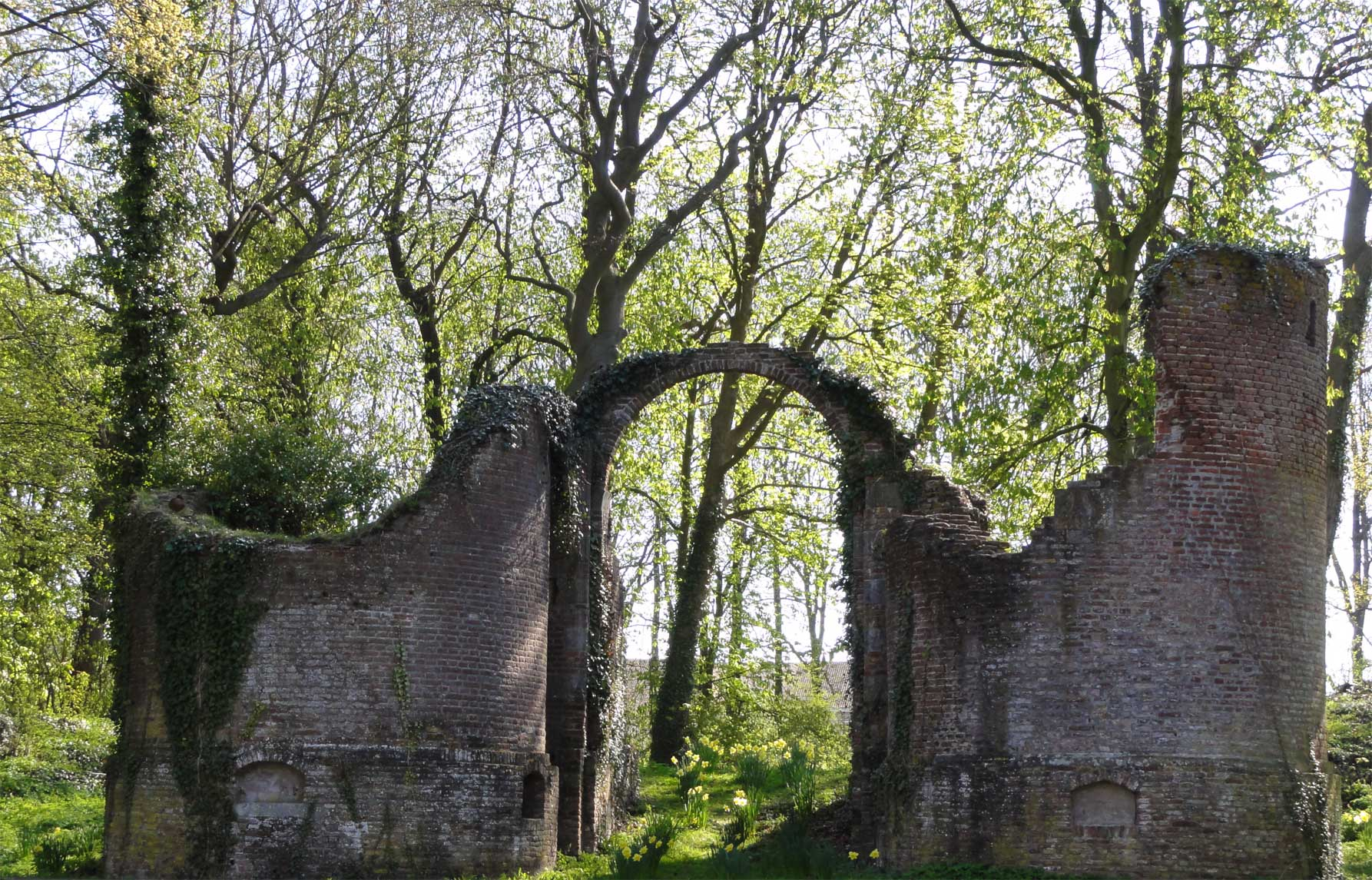 Ruïne Toutenburg in Vollenhove